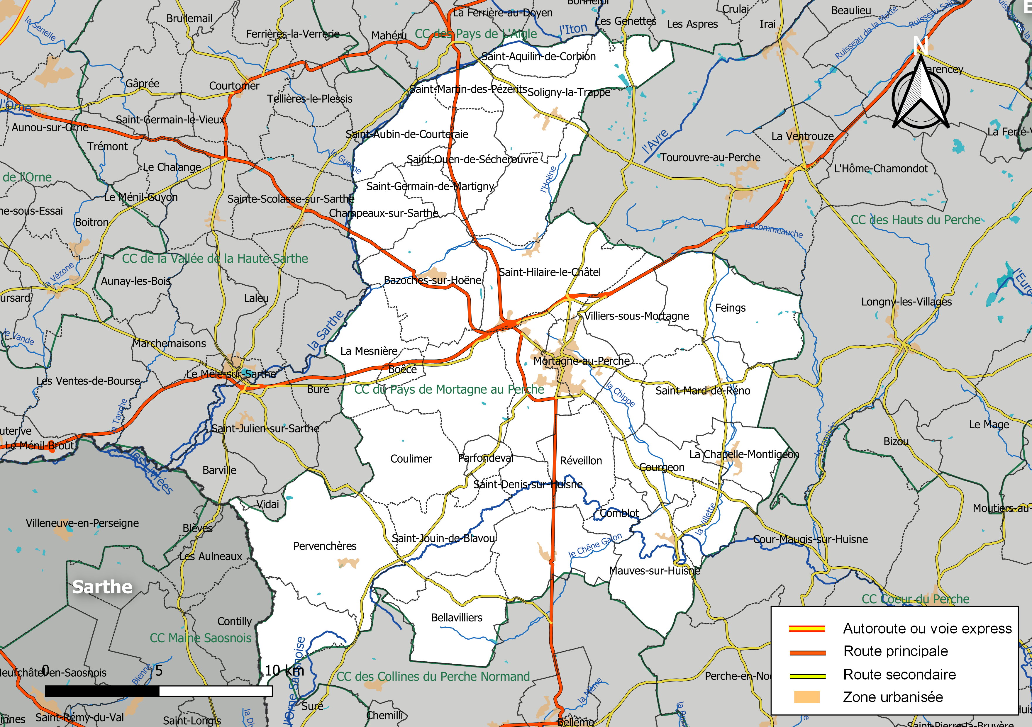 Carte géographique de la Communauté de communes du Pays de Mortagne au Perche, département de l'Orne, France. Composition au 1er janvier 2019.